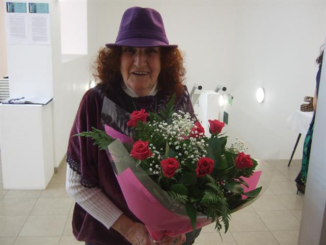 לאה הרפז בפתיחת תערוכה בחדרה